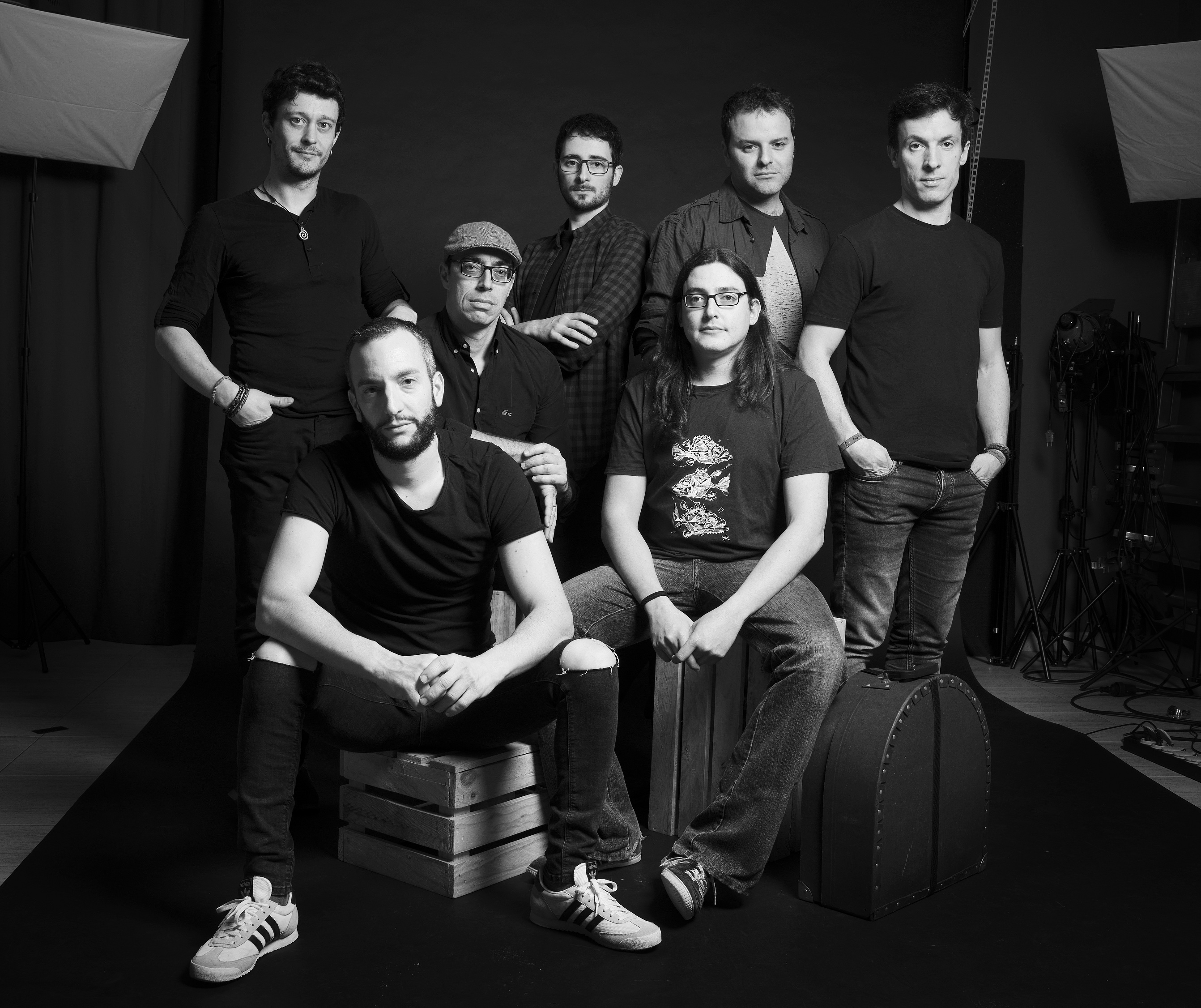 Formación 2017